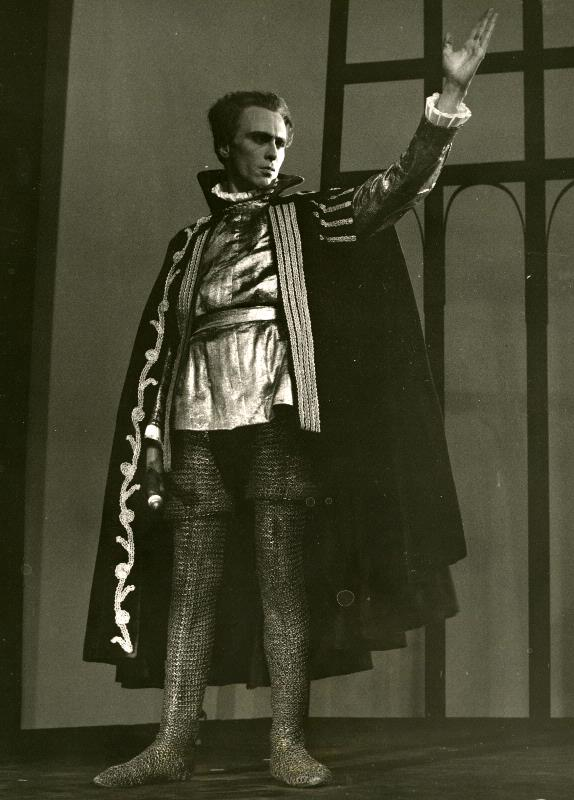 Lennart Tollén i Hamlet på Helsingborgs stadsteater.